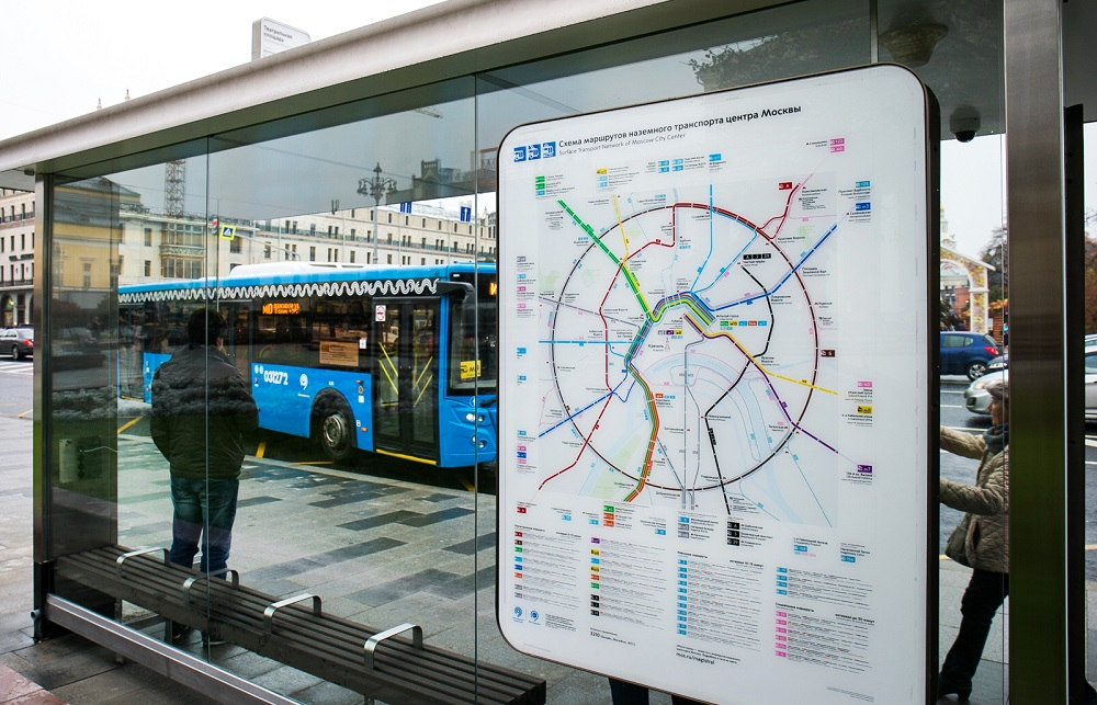 Остановка общественного транспорта в Театральном проезде в Москве со схемой маршрутов наземного общественного транспорта.